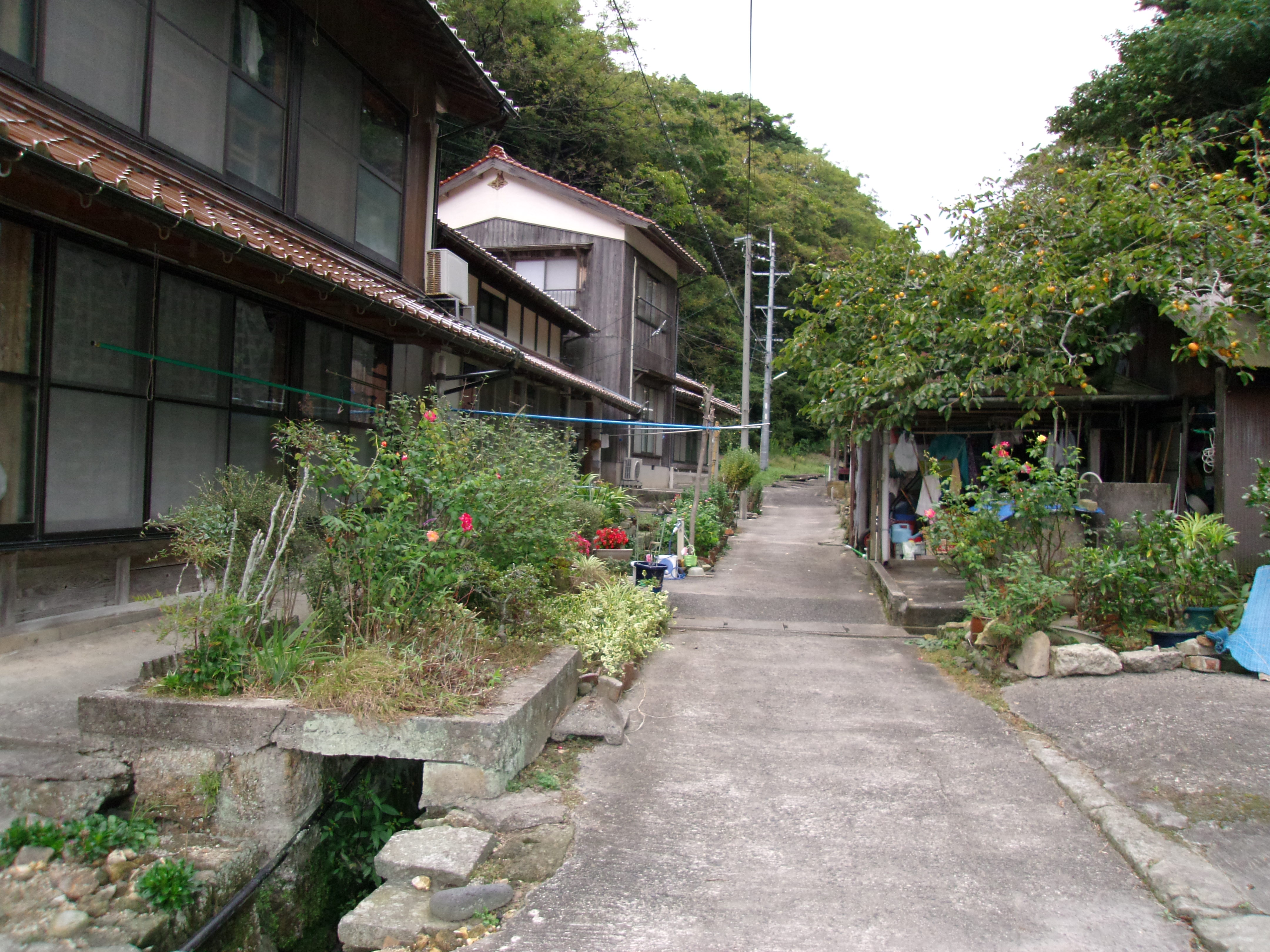 世界遺産「石見銀山」の構成資産である銀山街道温泉津沖泊道 沖泊集落に着き銀山街道は終わる